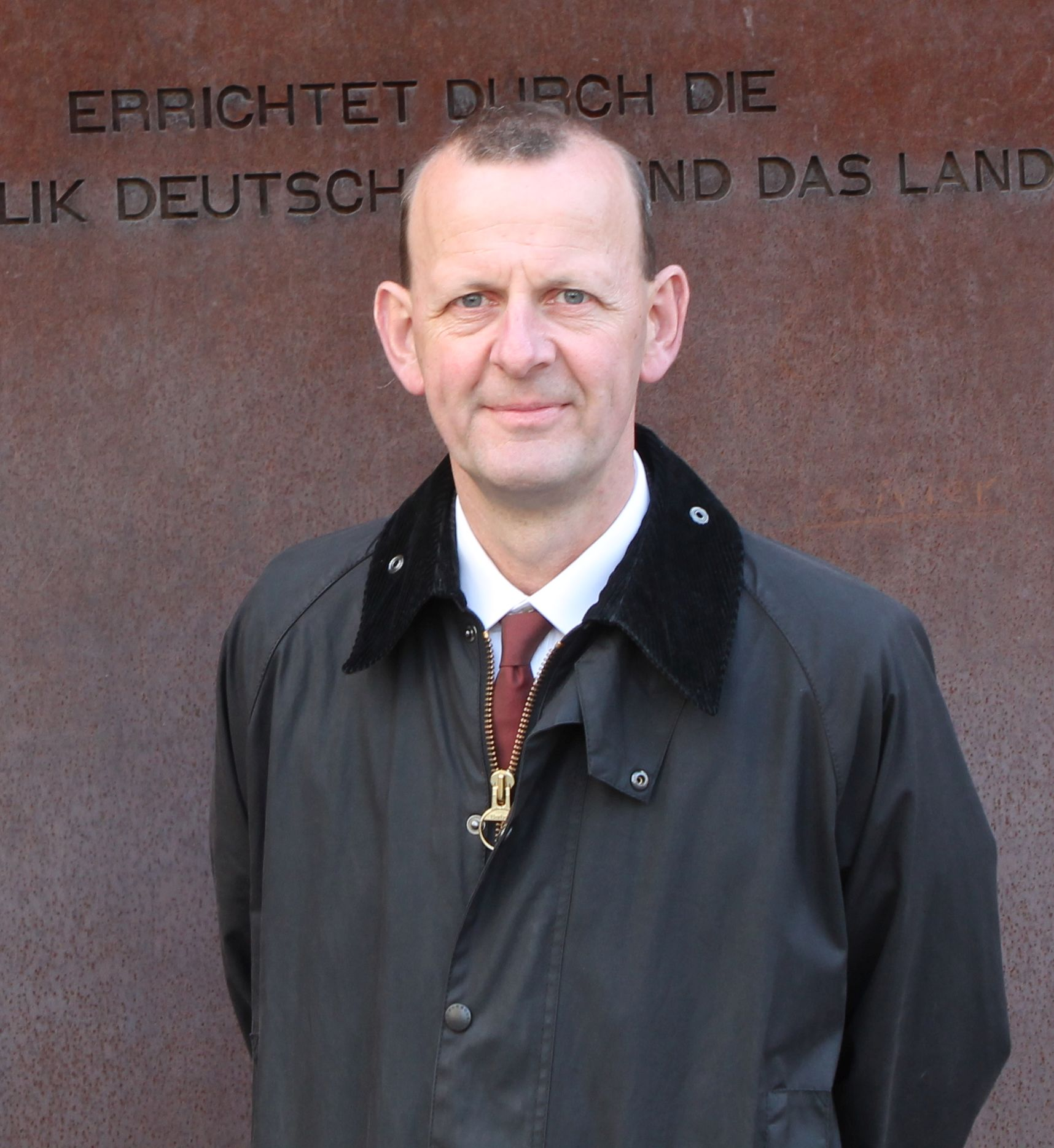 Axel Klausmeier am Denkmal der Gedenkstätte Berliner Mauer